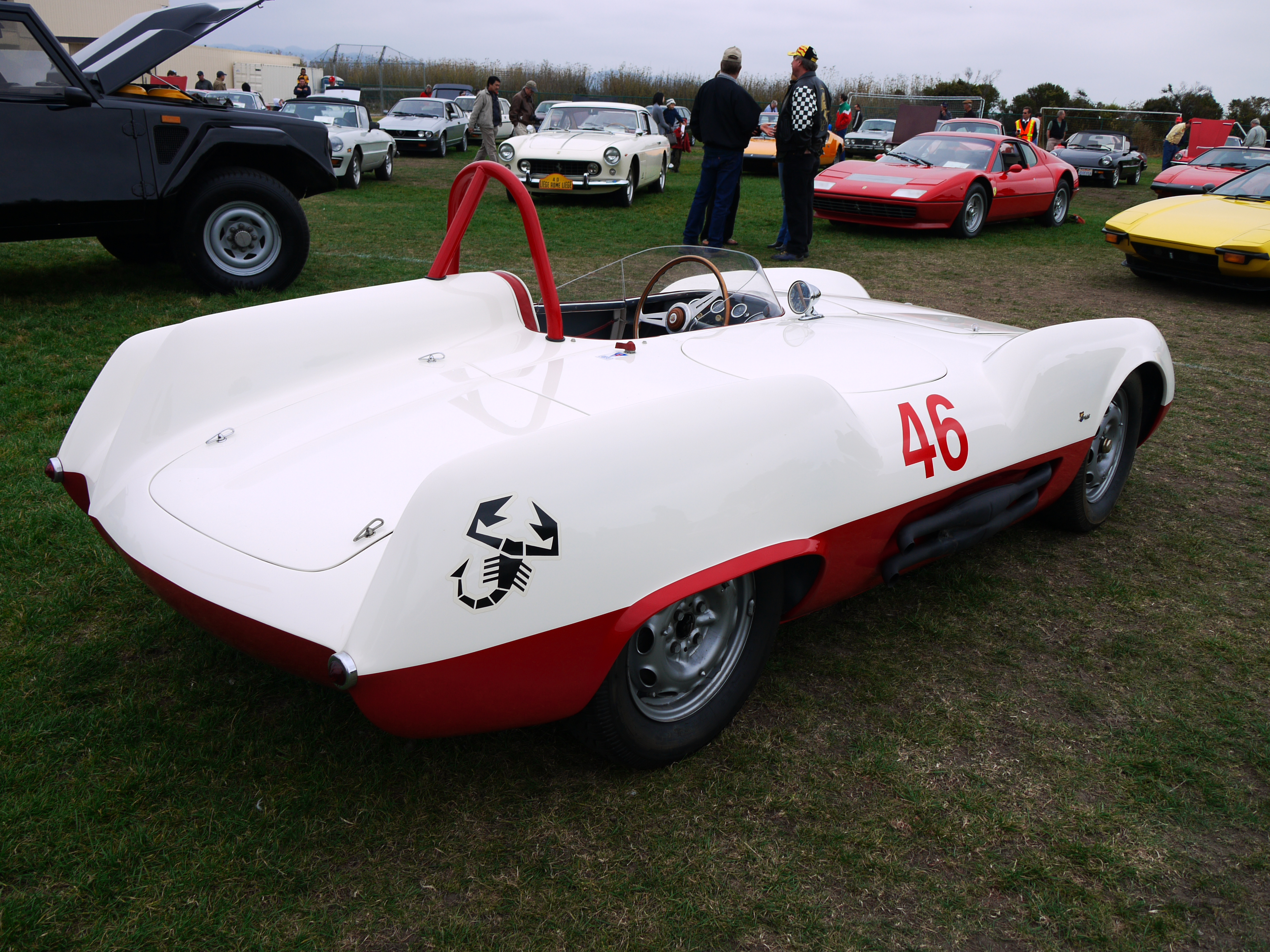 Abarth 207 A Boano Spider Corsa del 1955